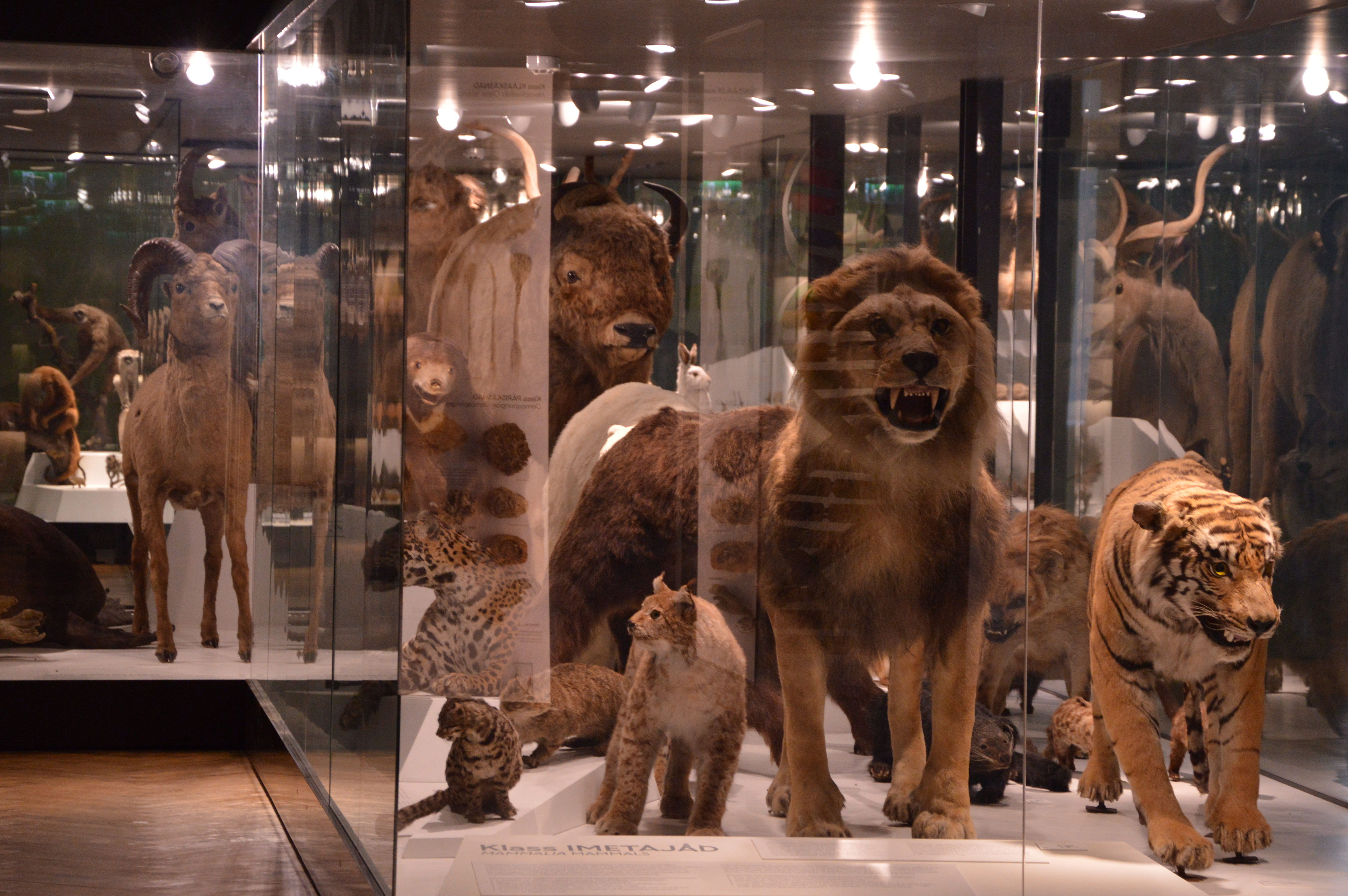 Tartu Ülikooli Loodusmuuseum. Sisevaade.